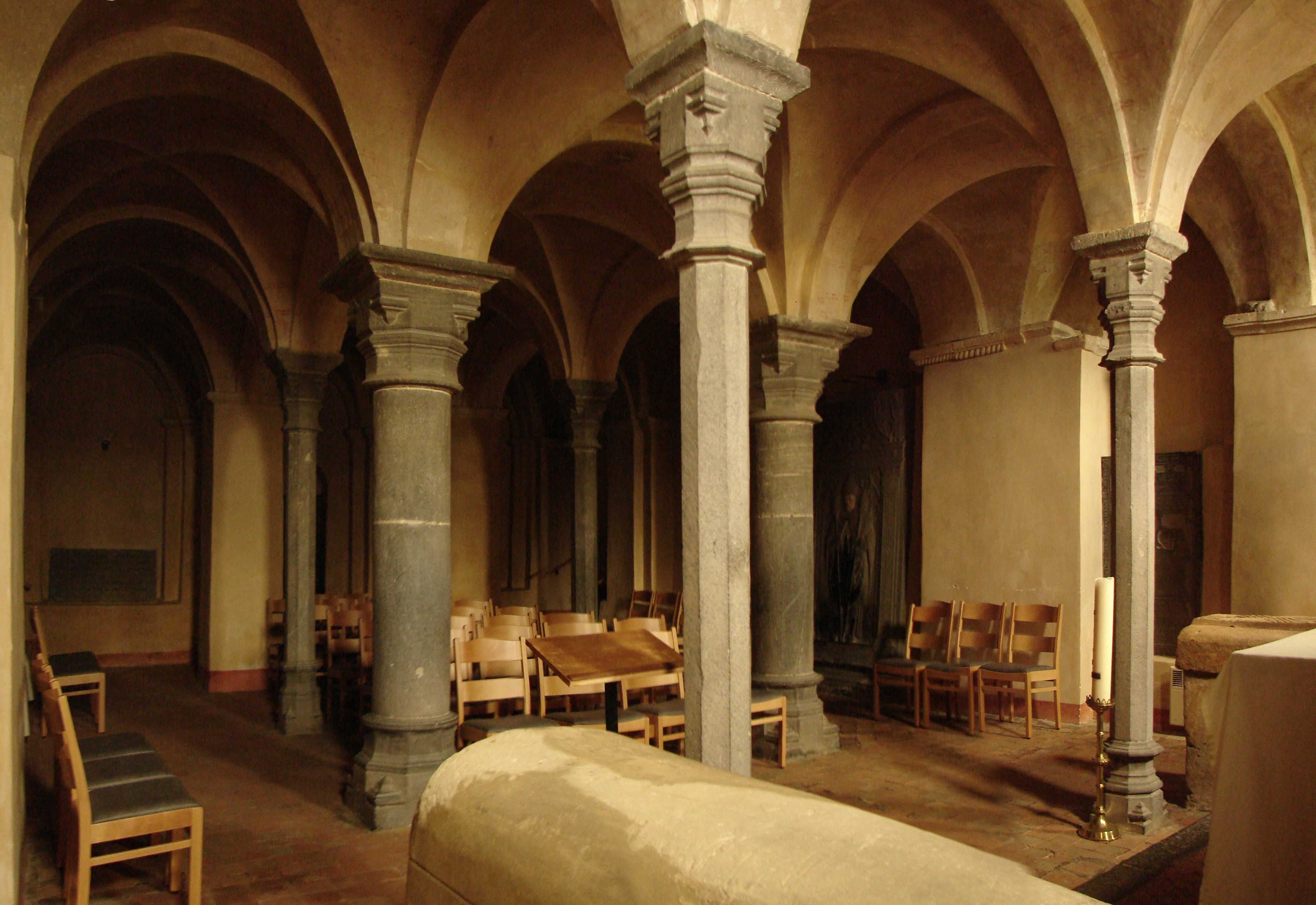 De crypte van de Sint Ursmerkerk te Lobbes